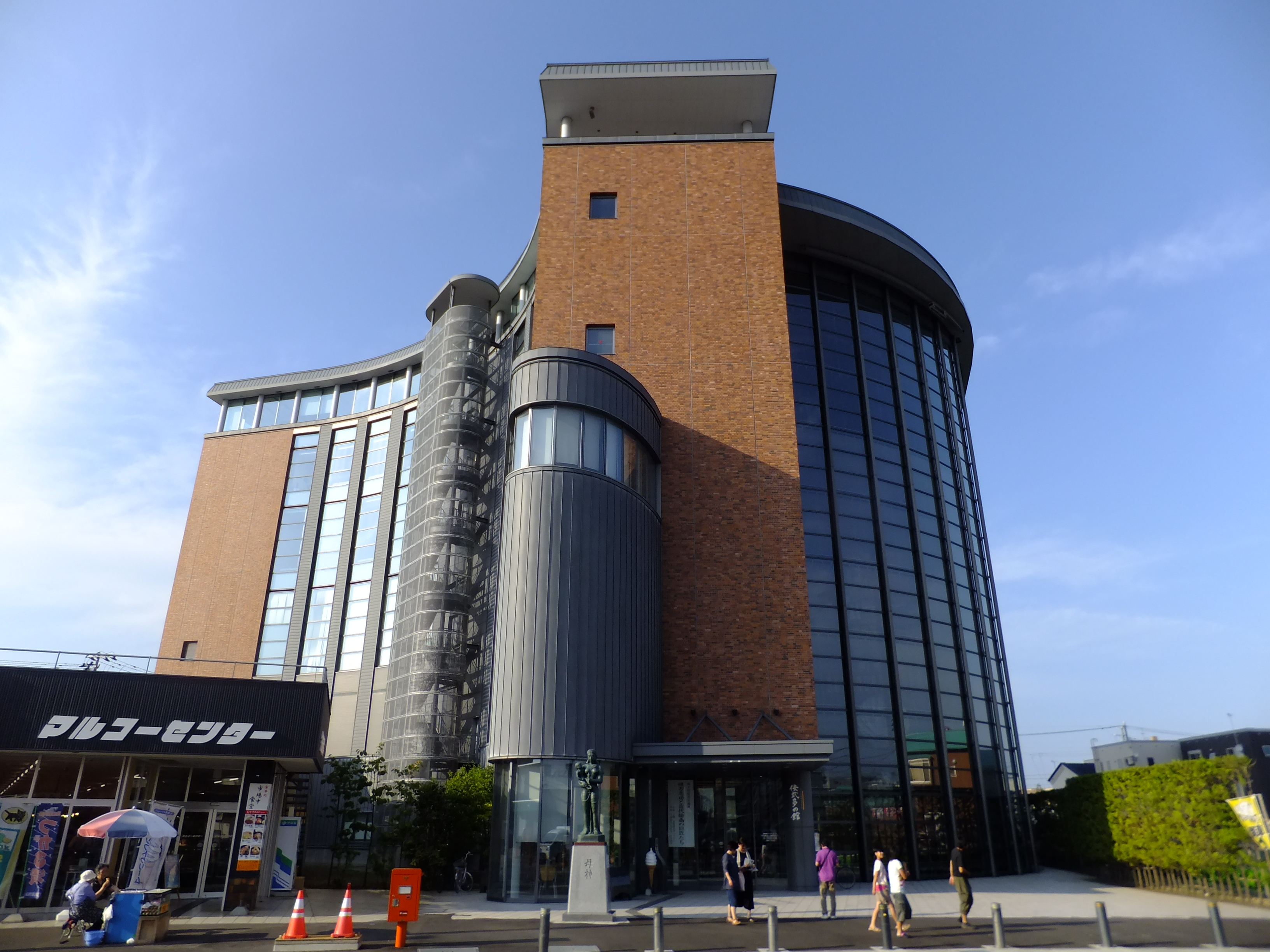 立佞武多の館（青森県五所川原市）